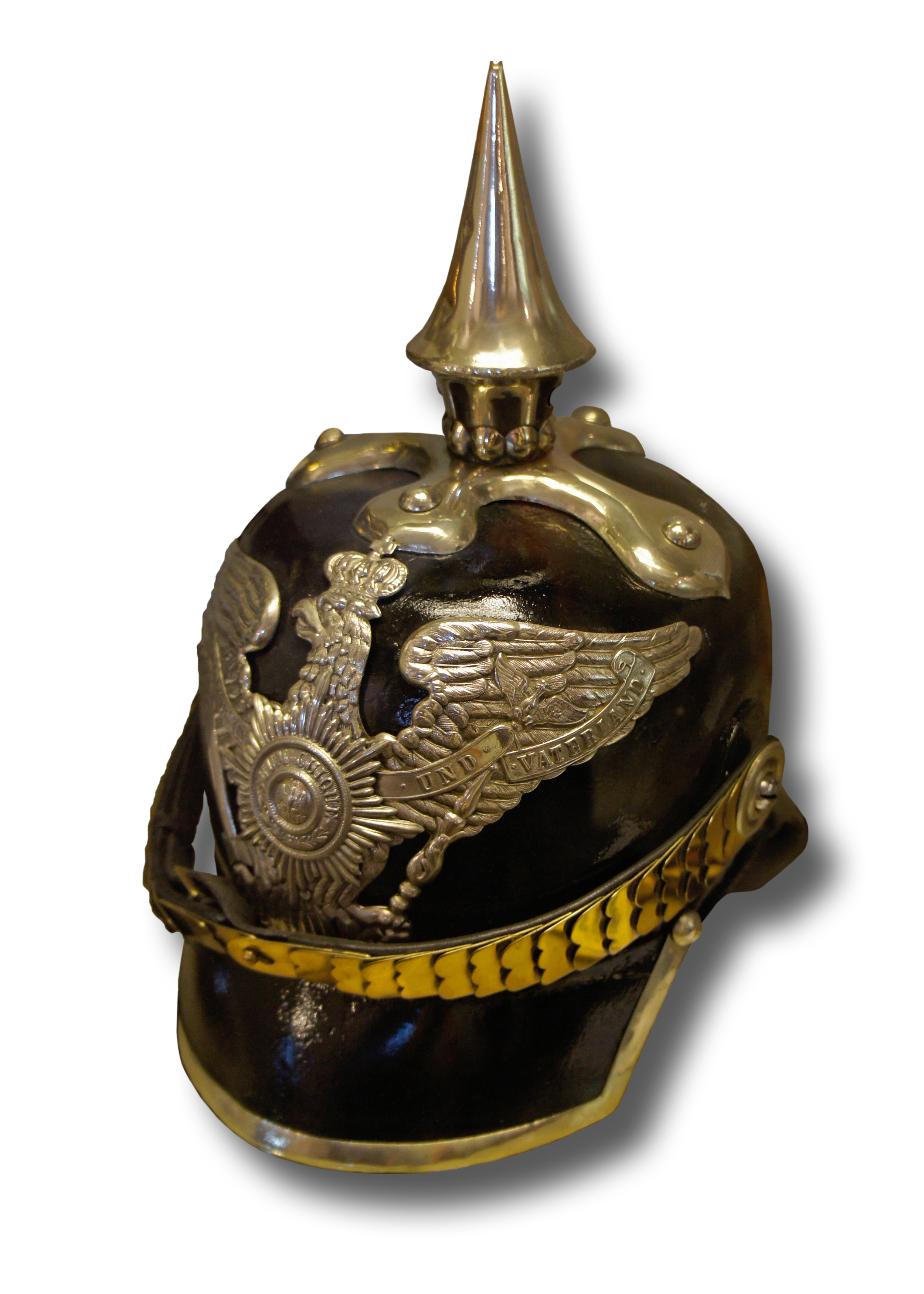 Prusse_casque d'infanterie_de_la_Garde_modèle 1860_.